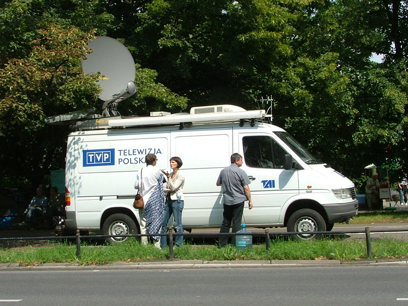 PL, Warsaw, Poland, Al. Ujazdowskie, Protest pielęgniarek